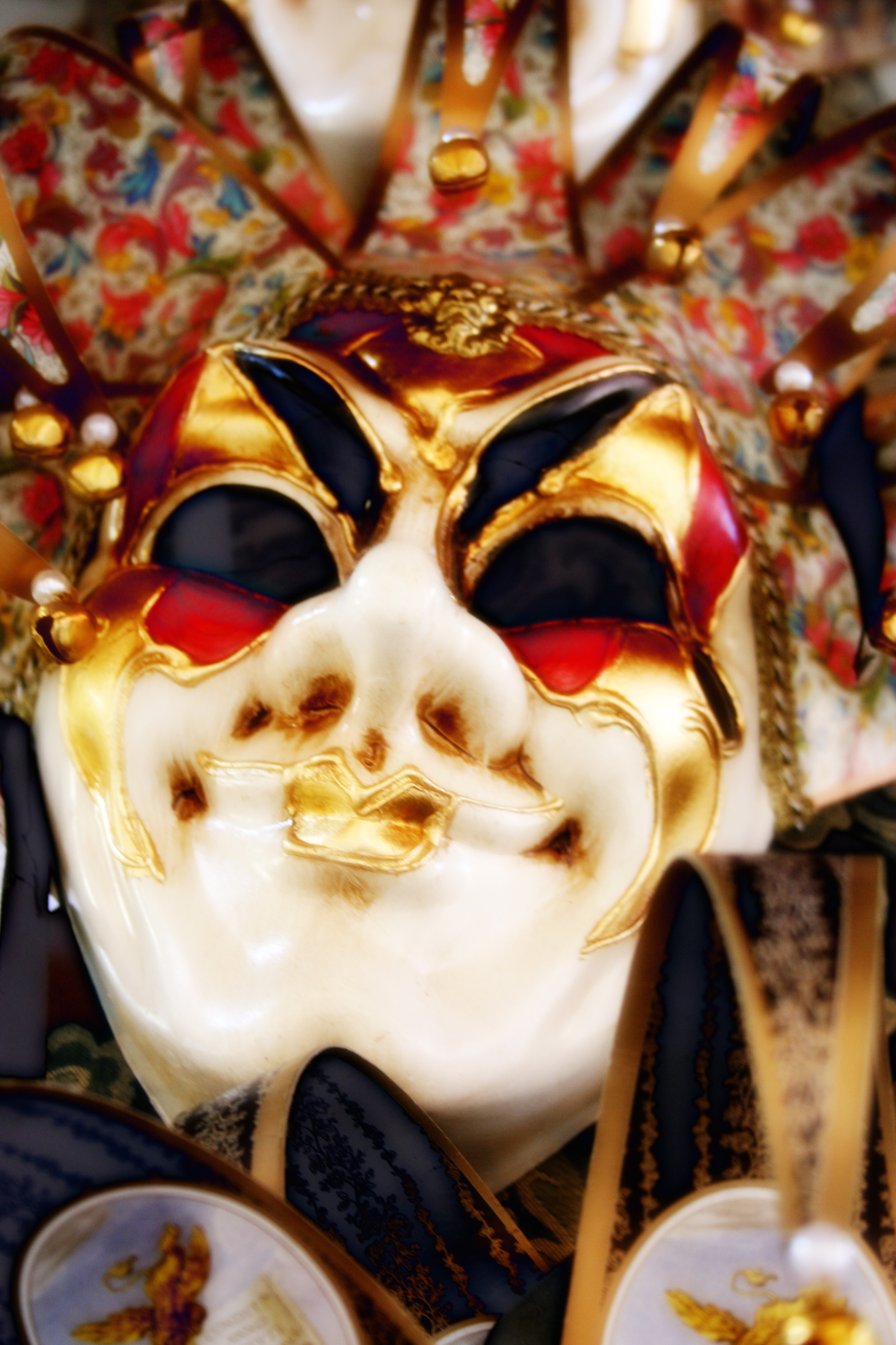 Sardonic